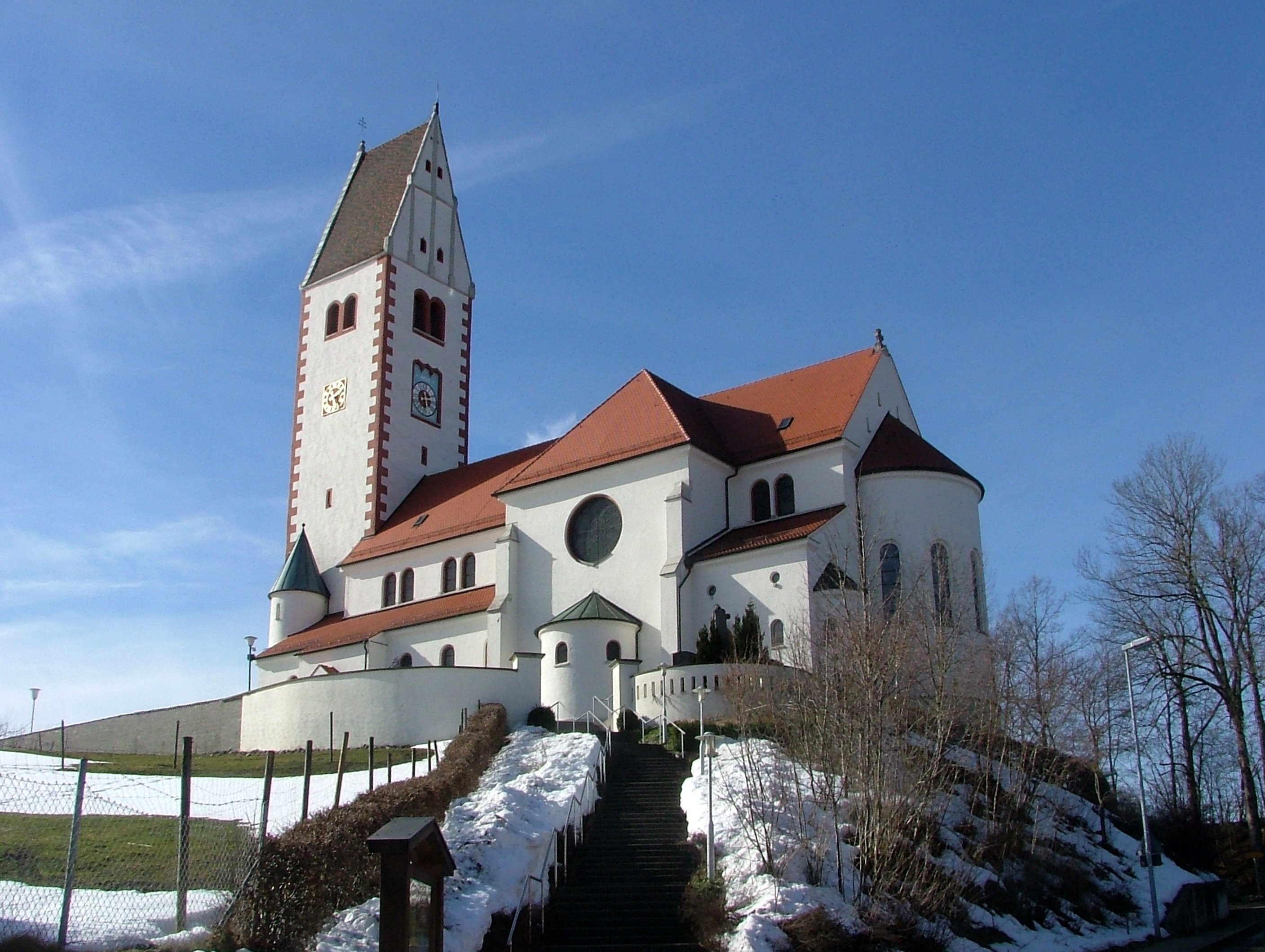 Hauerz